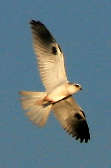 A White-tailed kite (Elanus leucurus)